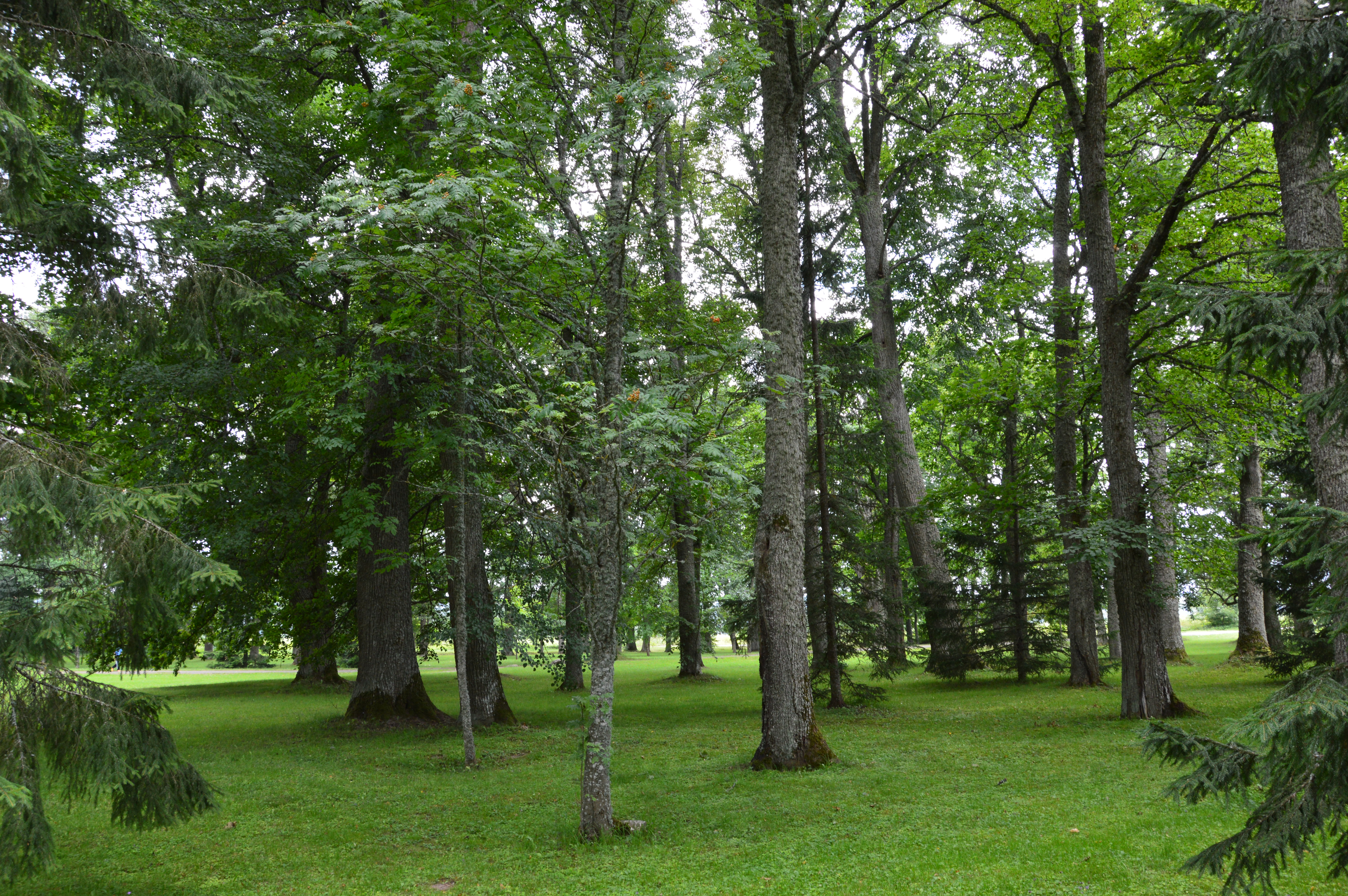 Paju mõisa park